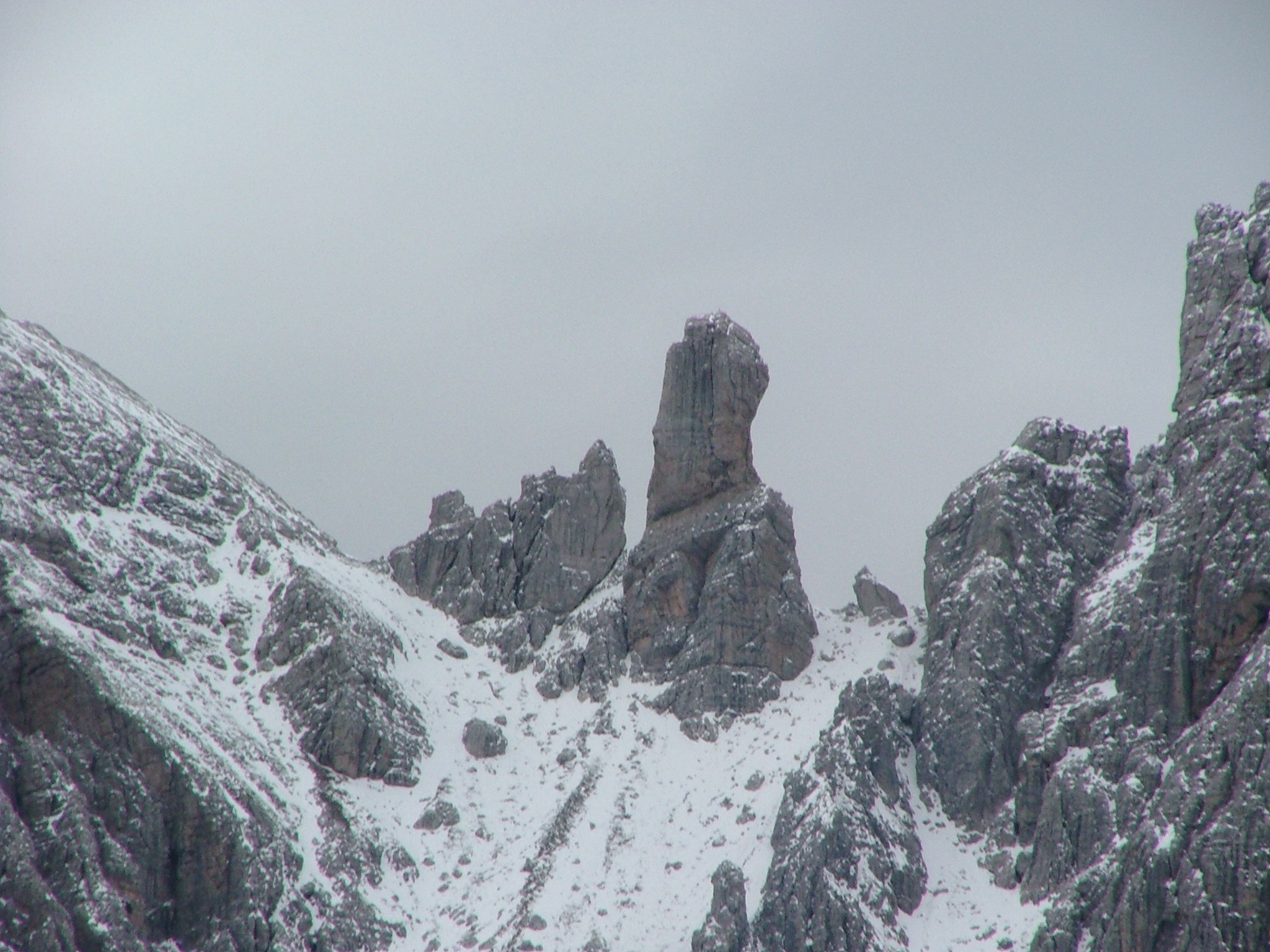 Pupo di San Lorenzo, Lozzo di Cadore, Marmarole, Dolomites, Italy